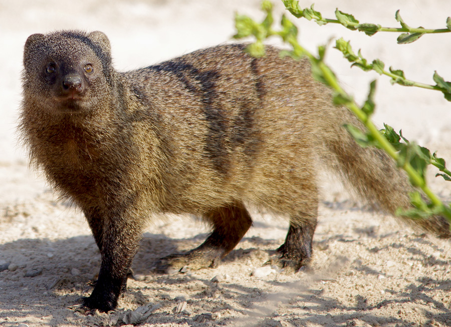 Египетский мангуст, или фараонова крыса, или ихневмо́н Herpestes ichneumon נמייה מצויה Сфотографировано в районе Мааган Михаэль